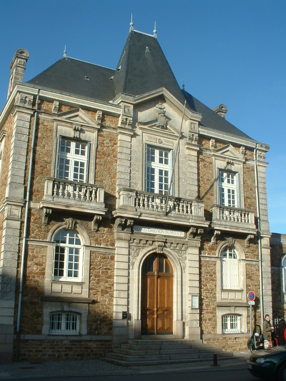 Rezé (France) - Hôtel Grigon-Dumoulin (1895) ancien hôtel de Ville de Rezé, devenu annexe de la mairie